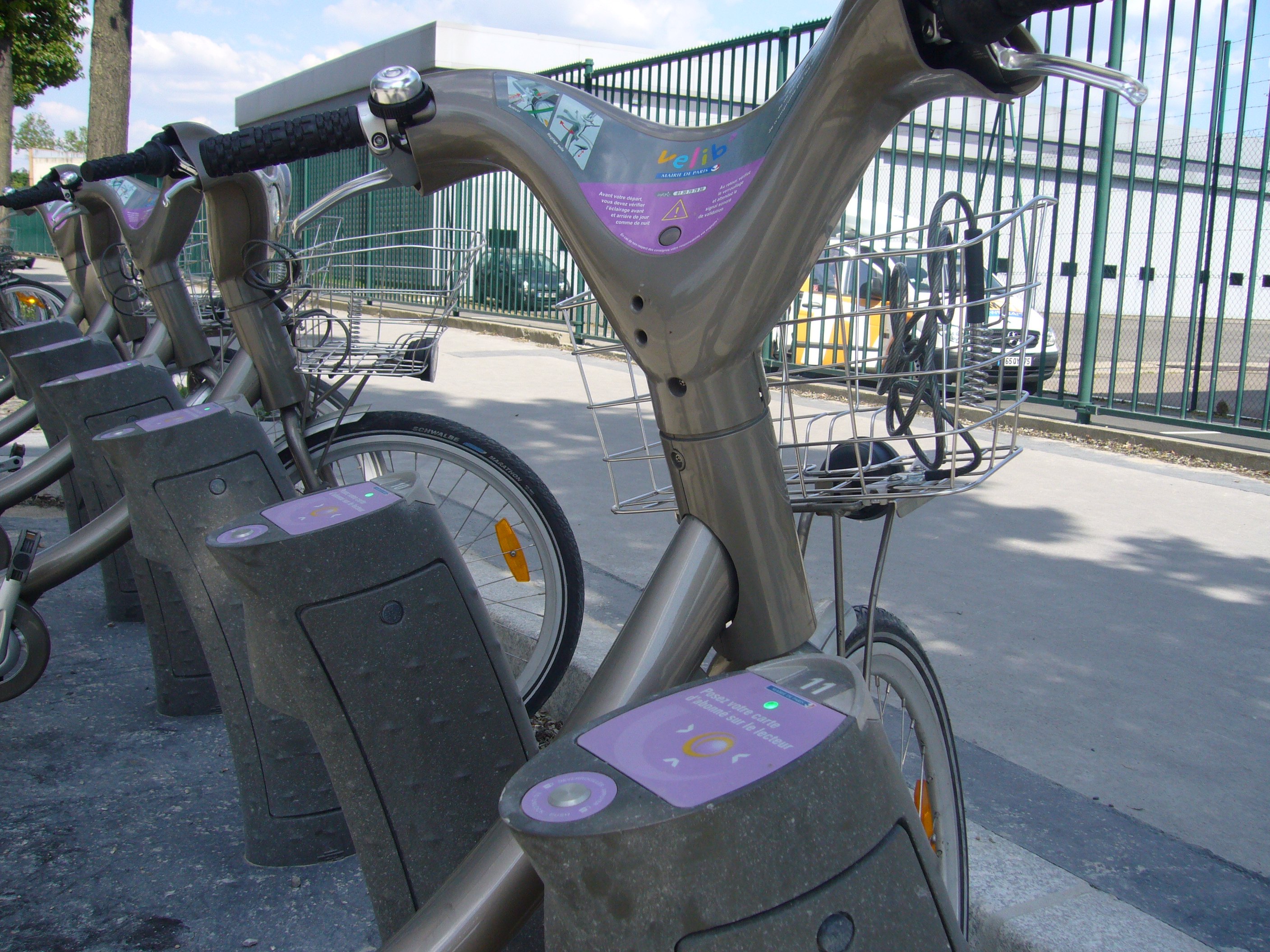 Bornettes d'attache Velib'